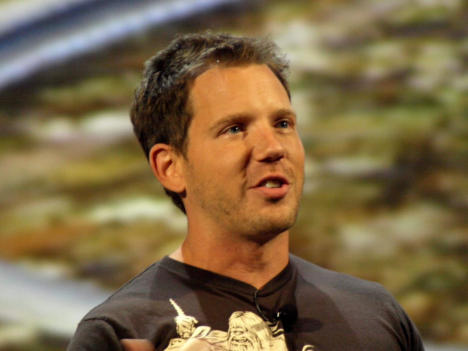 Foto de Cliff Bleszinski durante el E3 2010 con motivo de la presentación de Gears of War 3.